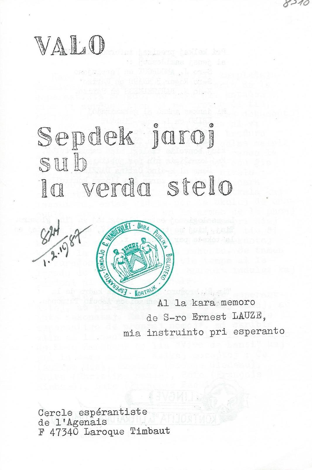 librokovrilo de libro "Sepdek Jaroj sub la Verda Stelo", 1980